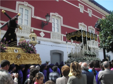 Encuentro del Viernes por la mañana entre las Dolores y el Padre Jesús